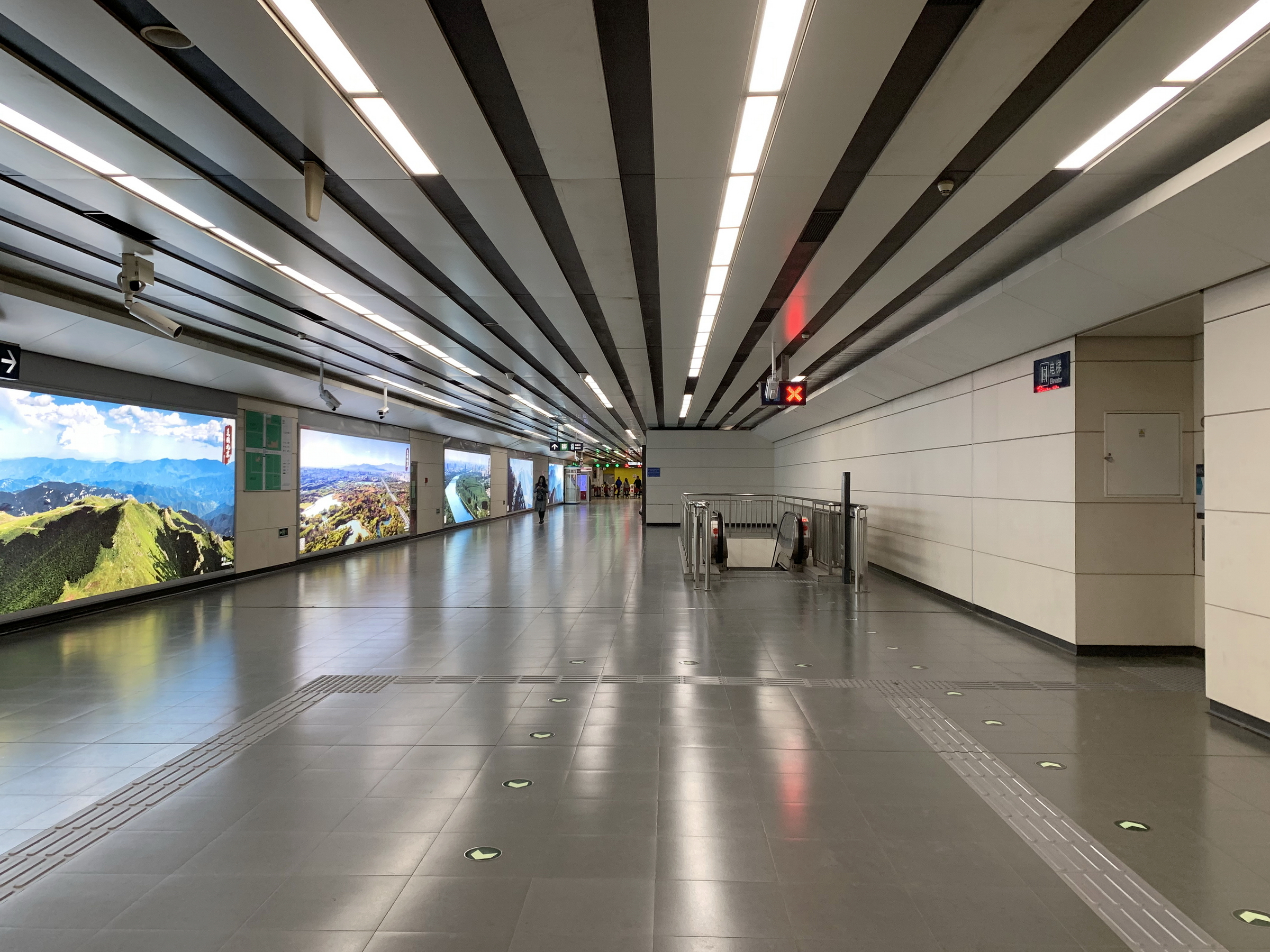 北京地铁10号线团结湖站站厅